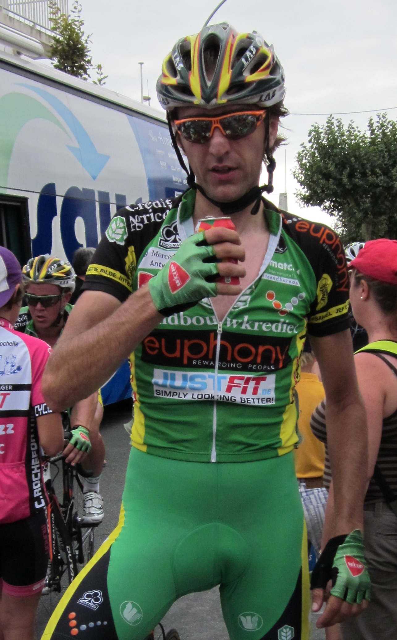 Dirk Bellemakers de l'équipe Euphony à l'arrivée de la 1ère étape du Tour du Poitou-Charentes 2012.